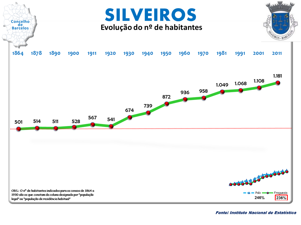 Censos 1864/2011